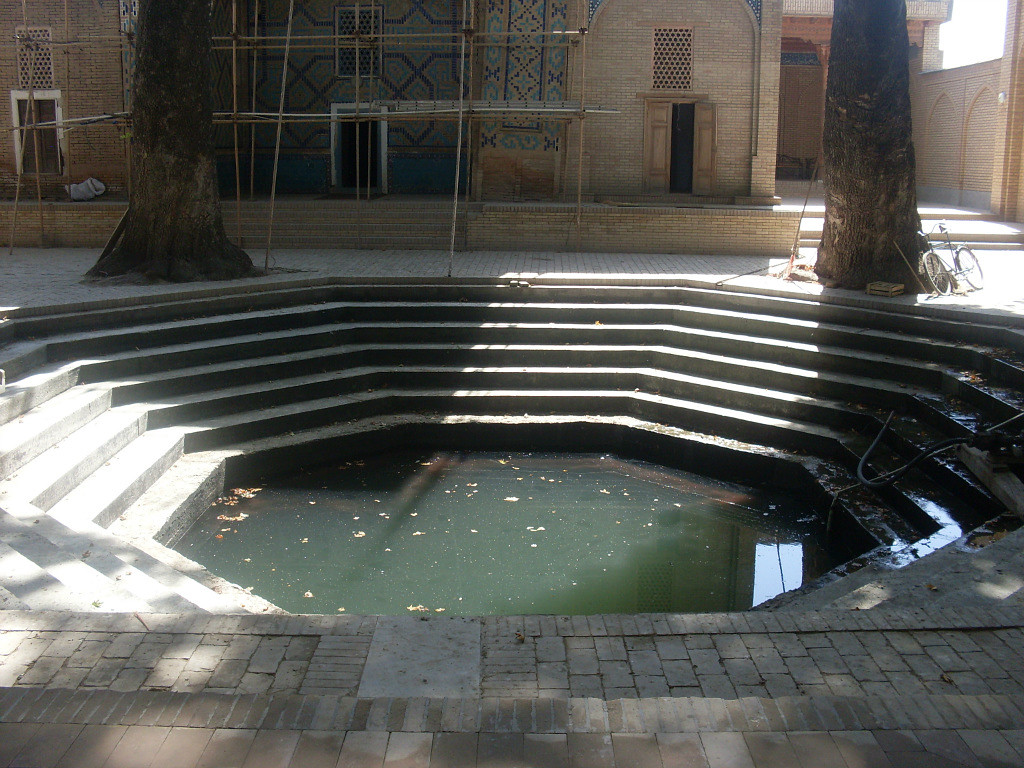 Ensemble Abdi Darun Ансамбль Абди-Дарун